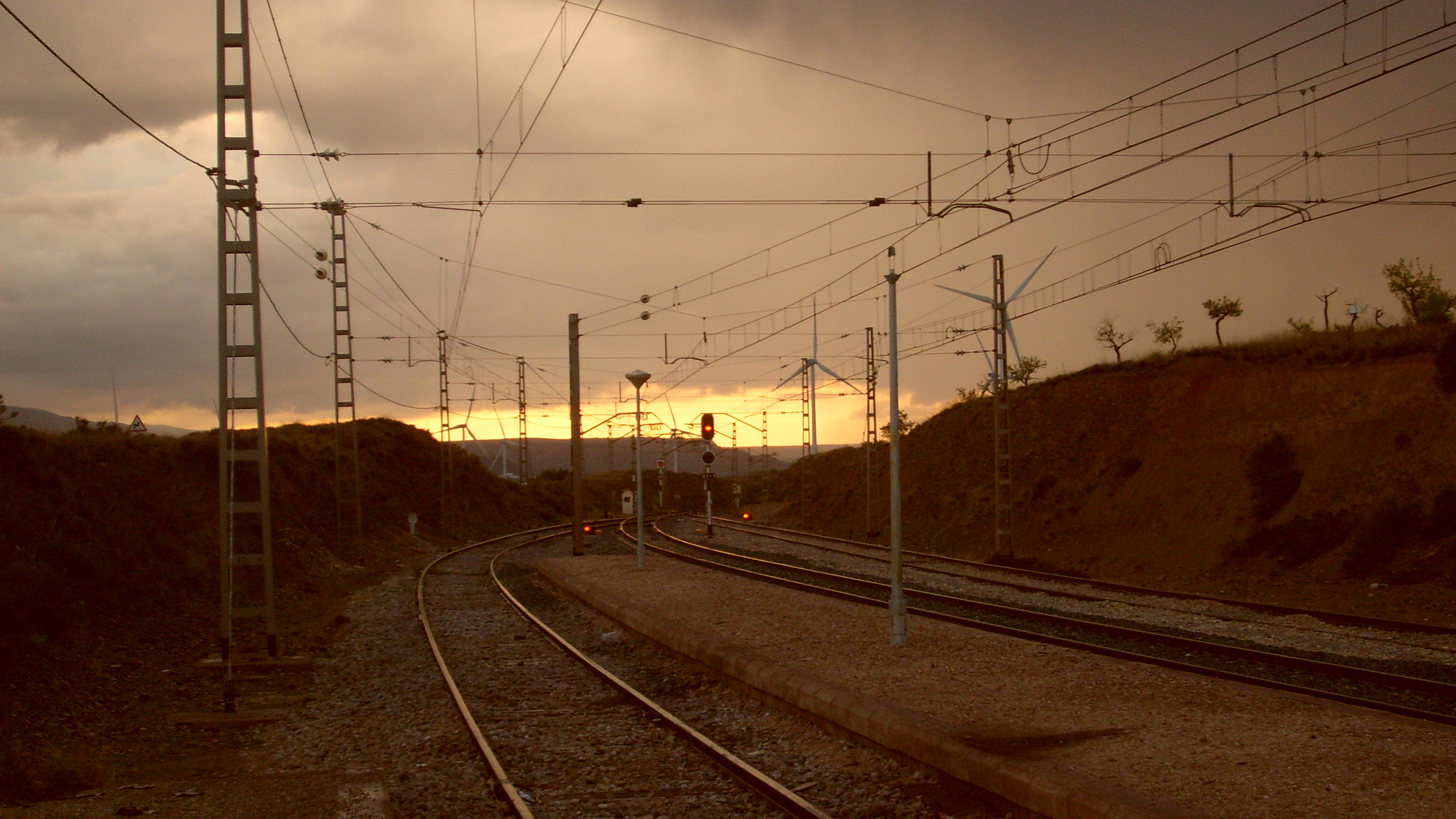 Playa de vías de la estación de Abla y Abrucena.